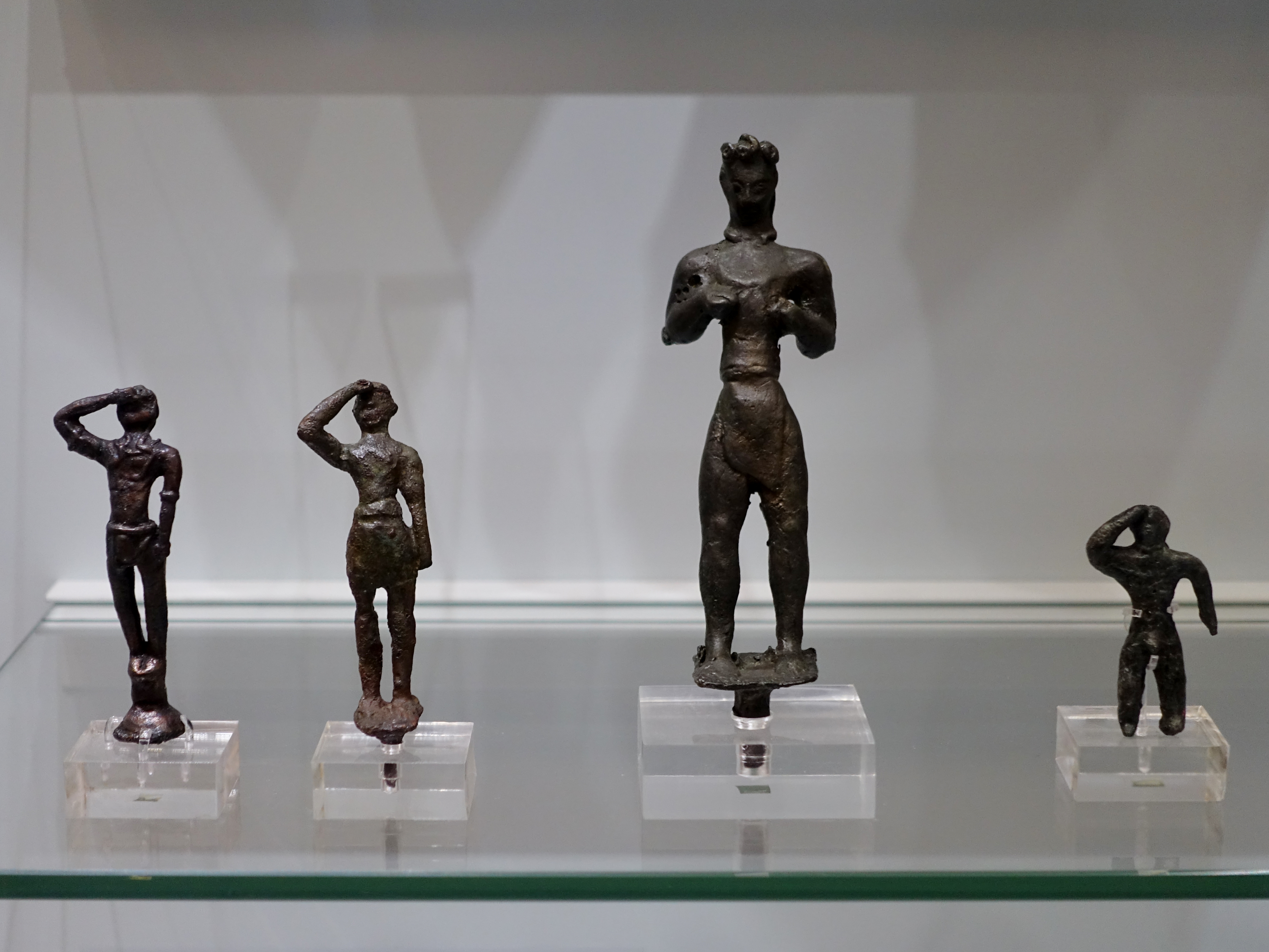 Bronzefigurinen von Adoranten (1600–1000 v. Chr.), gefunden im Heiligtum des Hermes und der Aphrodite bei Symi, Archäologisches Museum von Iraklio, Kreta, Griechenland